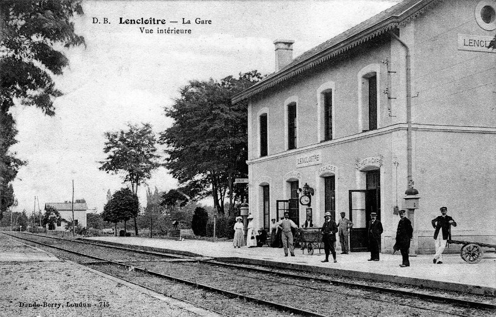 Le bâtiment voyageurs vers 1900.